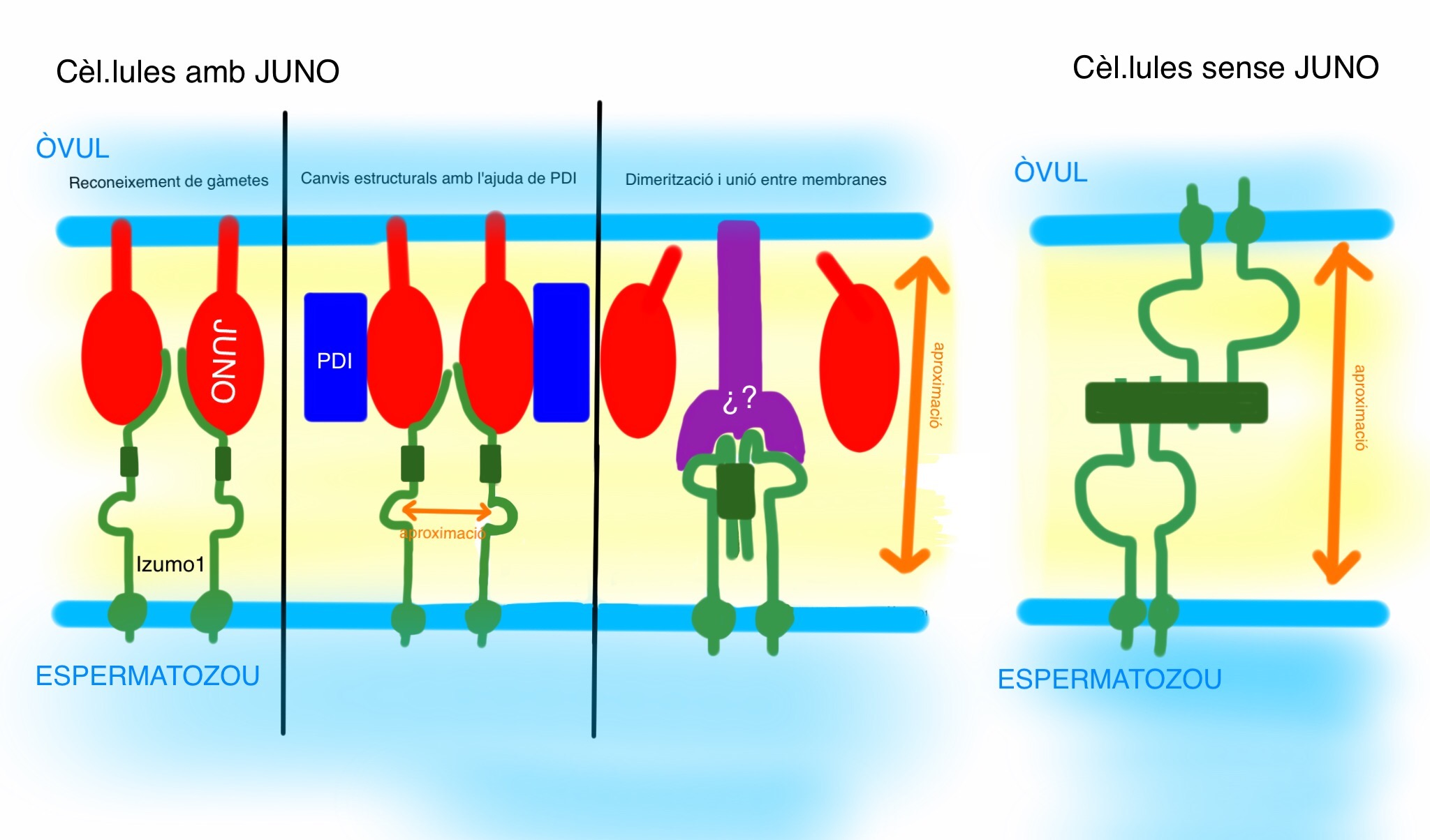 Mostra la unió entre gàmetes i com està regulada per les proteïnes